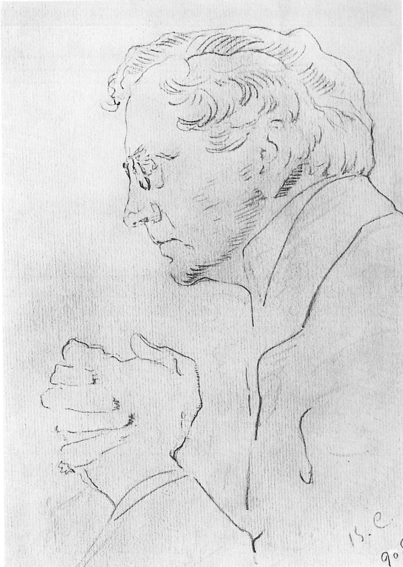 Zeichnung des russischen Schauspielers Wassili Iwanowitsch Katschalow (1875–1948), angefertigt von Walentin Alexandrowitsch Serow